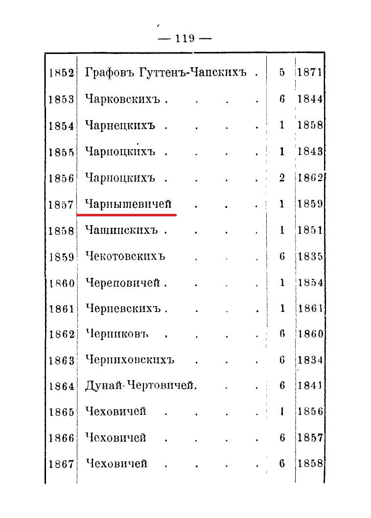 Nazwisko Czarnyszewicz w "Spisie rodzin szlachty guberni mińskiej" z 1903 roku.